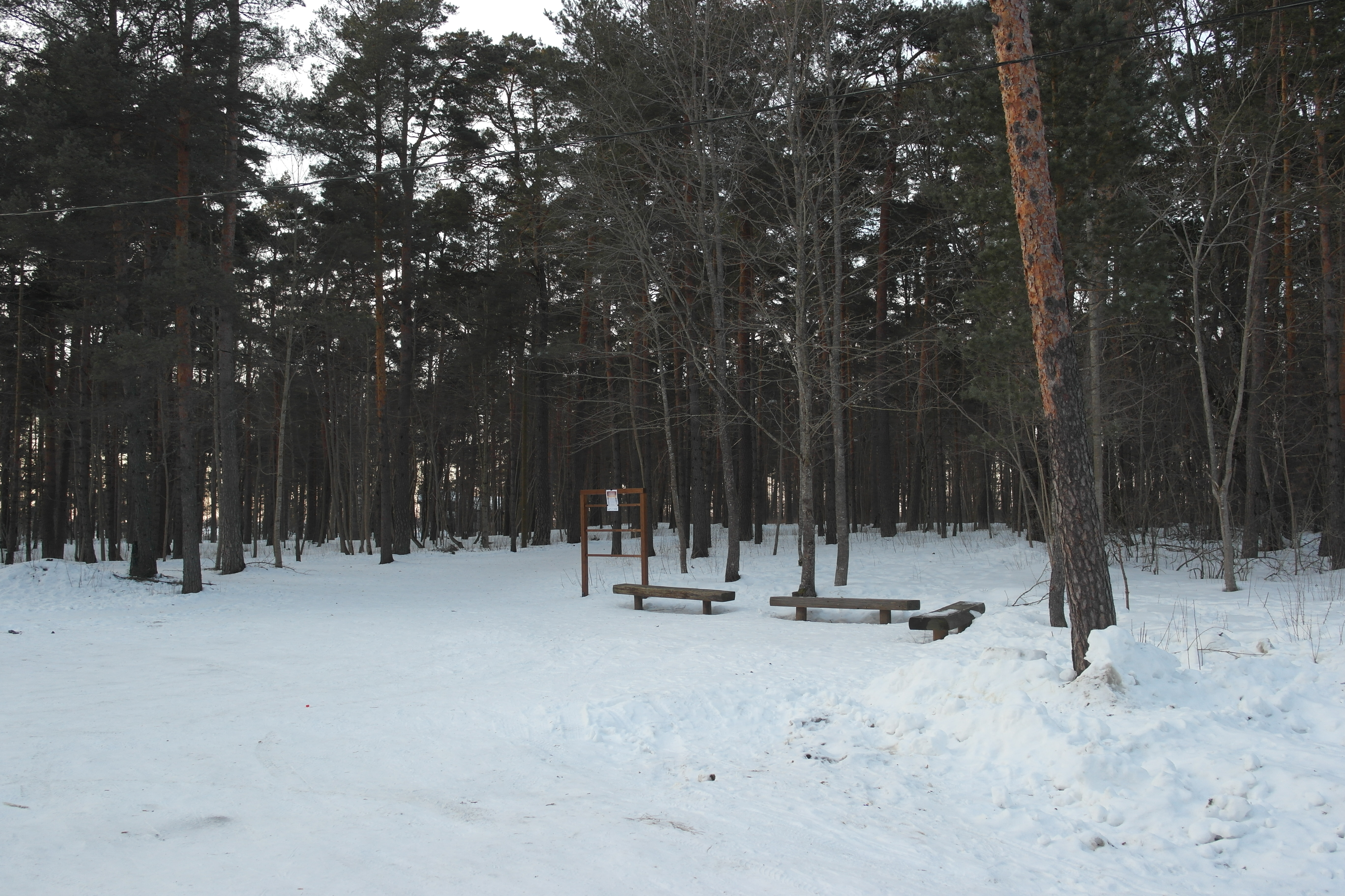 Aruküla terviserada